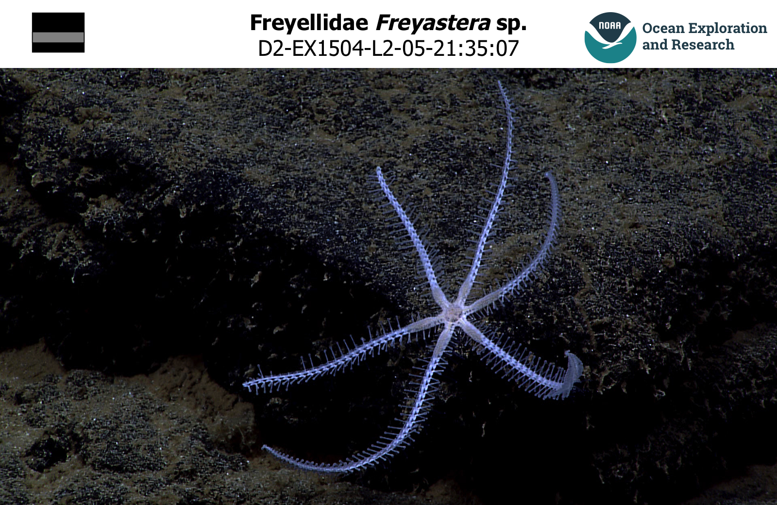 Une étoile de mer du genre Freyastera observée dans les abysses par la mission Okeanos Explorer.